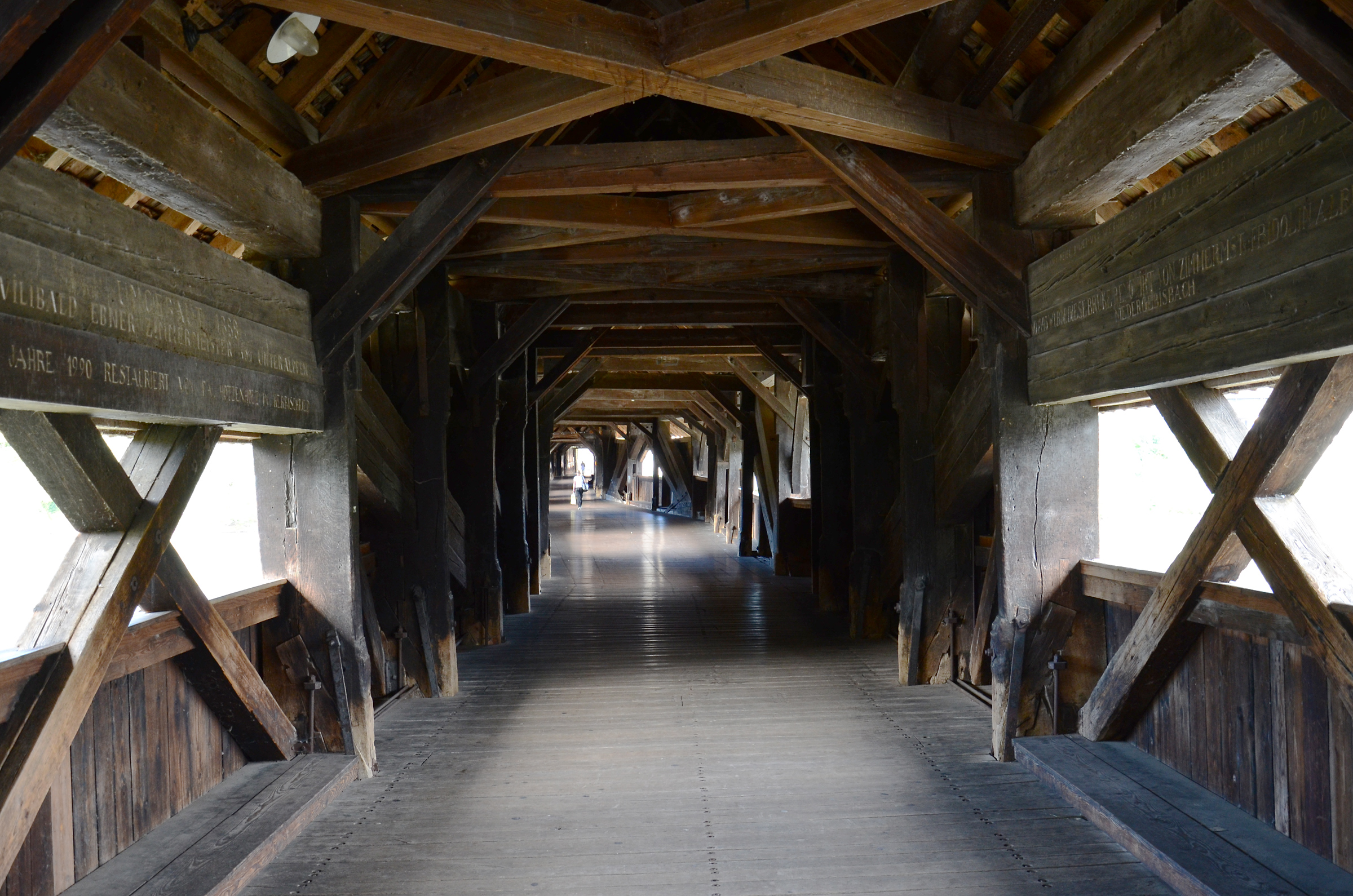 Bad Säckingen, Holzbrücke innen